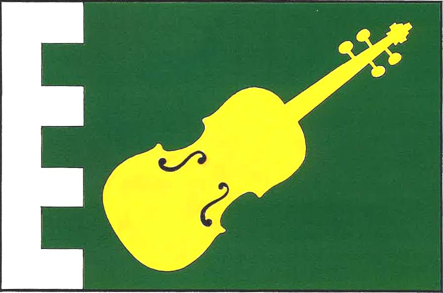 Blevice, vlajka. List tvoří bílý žerďový zubatý pruh, široký pětinu délky listu se čtyřmi čtvercovými zuby a třemi stejnými mezerami, a zelené pole, v něm šikmo žluté housle. Poměr šířky k délce listu je 2 : 3.